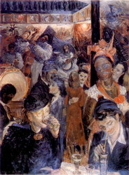 Srpskohrvatski / српскохрватски: Kabare “Boule Blanche“, Galerija Matice srpske u Novom Sadu